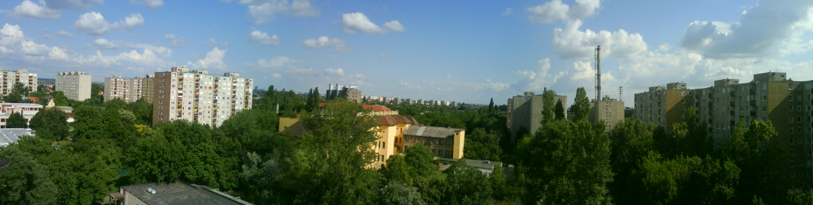 Budapest IV. kerülete (Újpest), panoráma